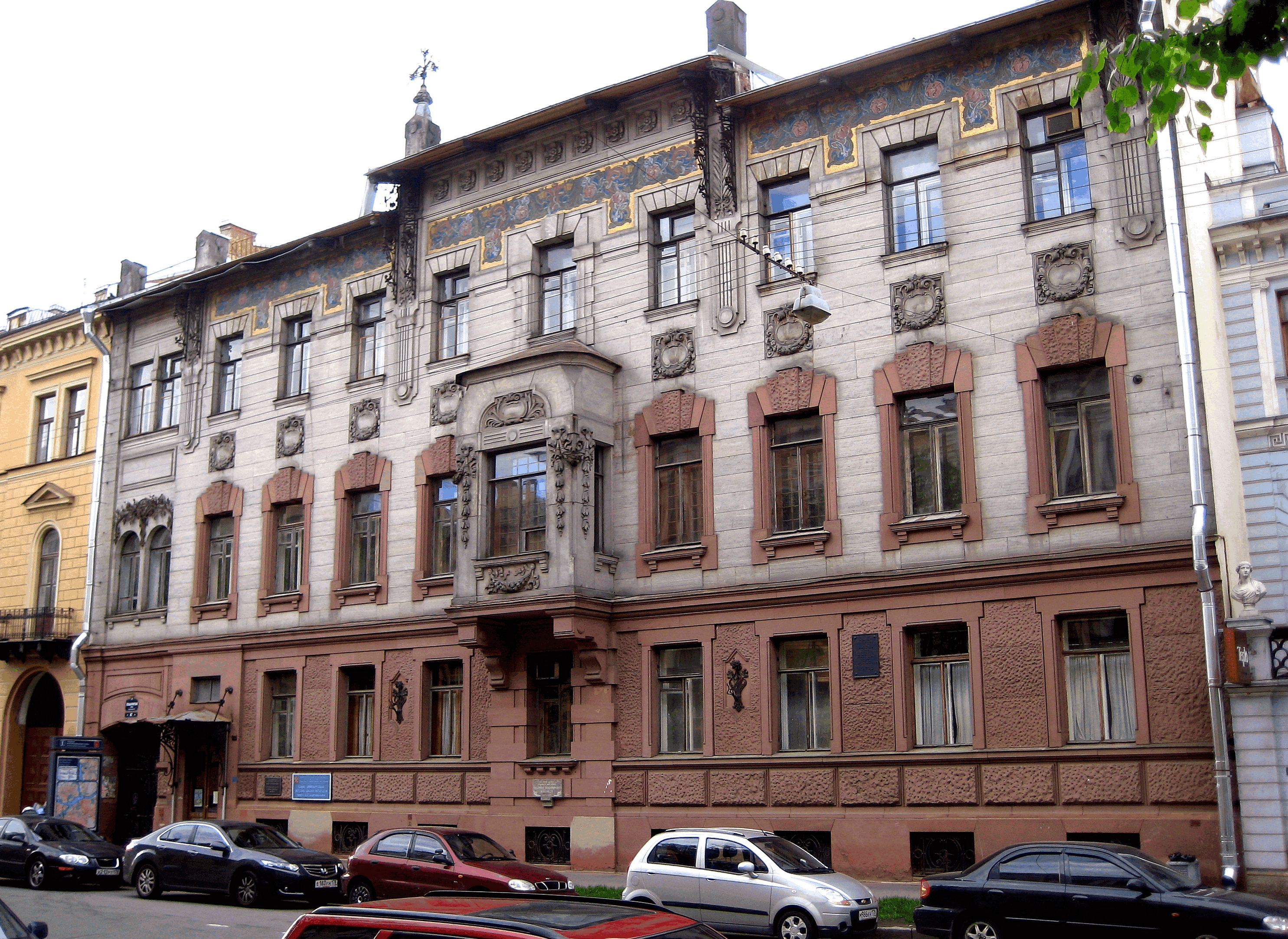 Дом Е.И. Набоковой с дворовыми флигелями: Большая Морская улица, 47, Адмиралтейский район, Санкт-Петербург